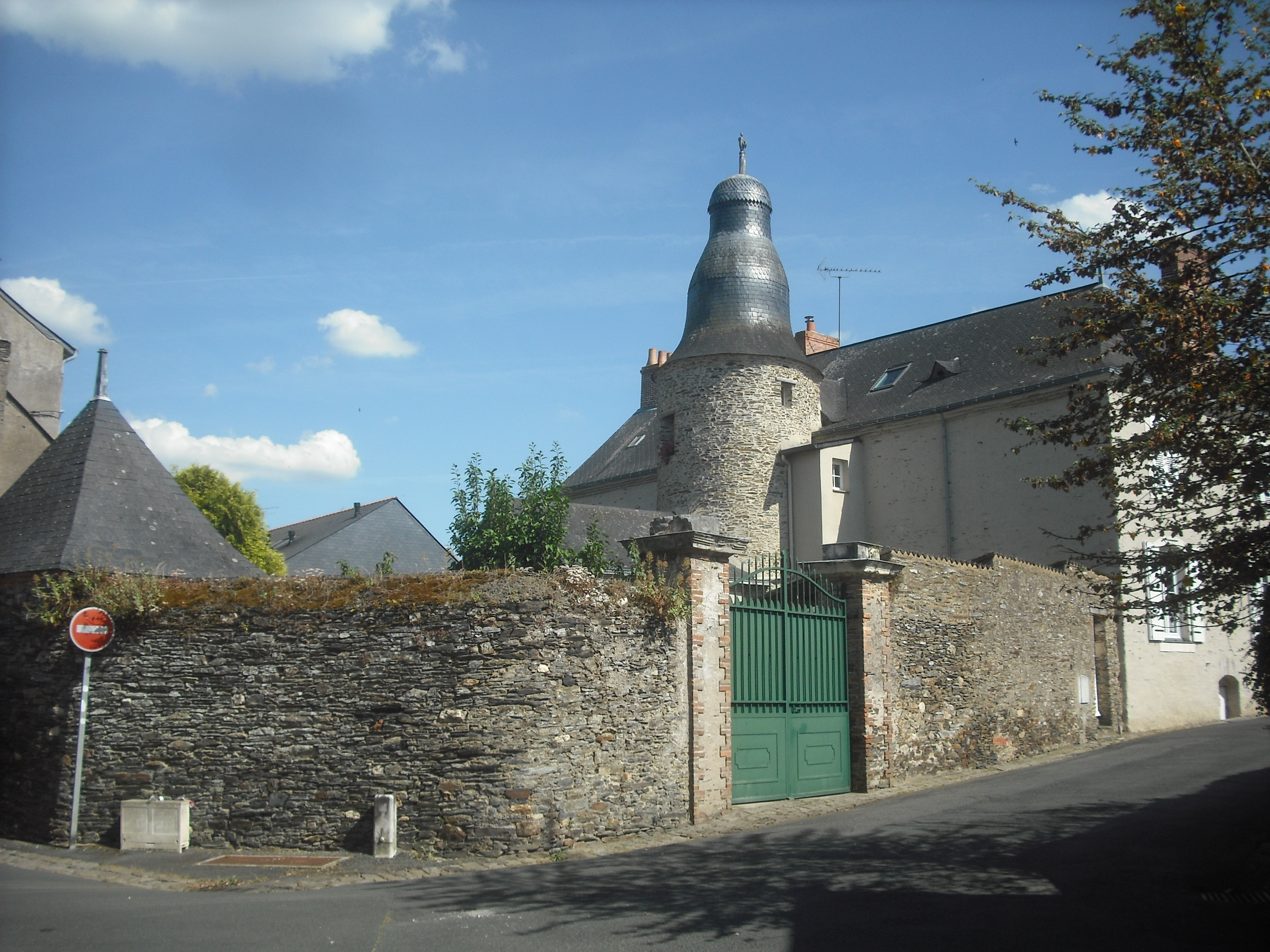 Ancien collège, Candé, Maine-et-Loire, France.